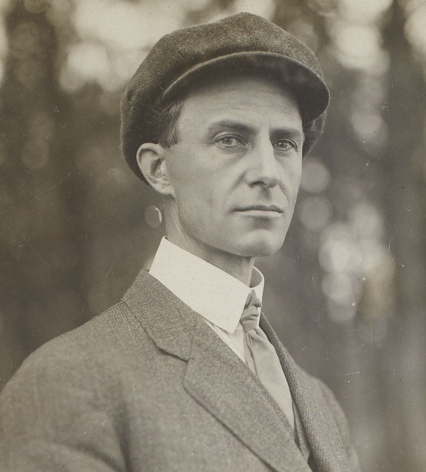 [Collection Jules Beau. Photographie sportive] : T. 35. AnnÃ©es 1908, 1909 et 1910 / Jules Beau